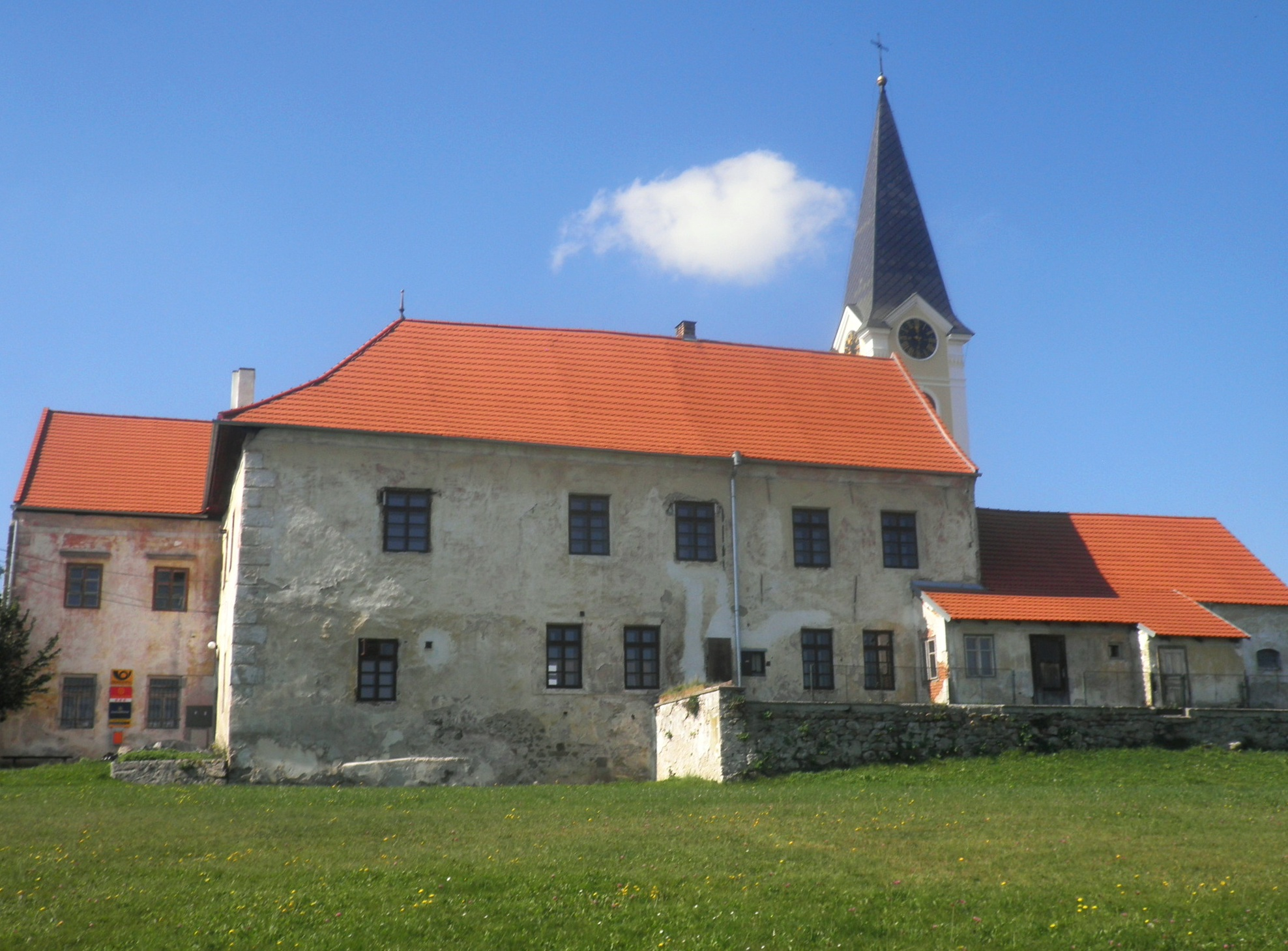 zámek (Olešnice), Olešnice 1